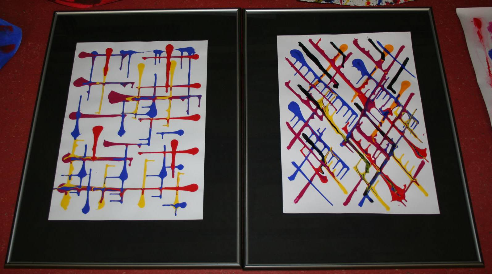 Bilder mit geflossenen Acrylfarben